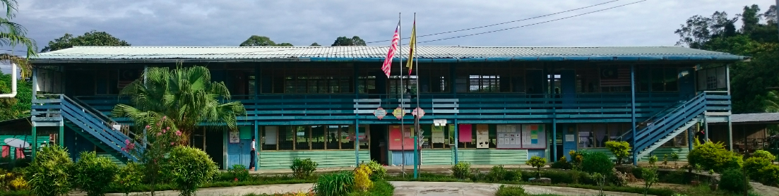 Bangunan sekolah